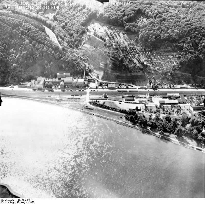 Rheinbefliegung der Alliierten 1953